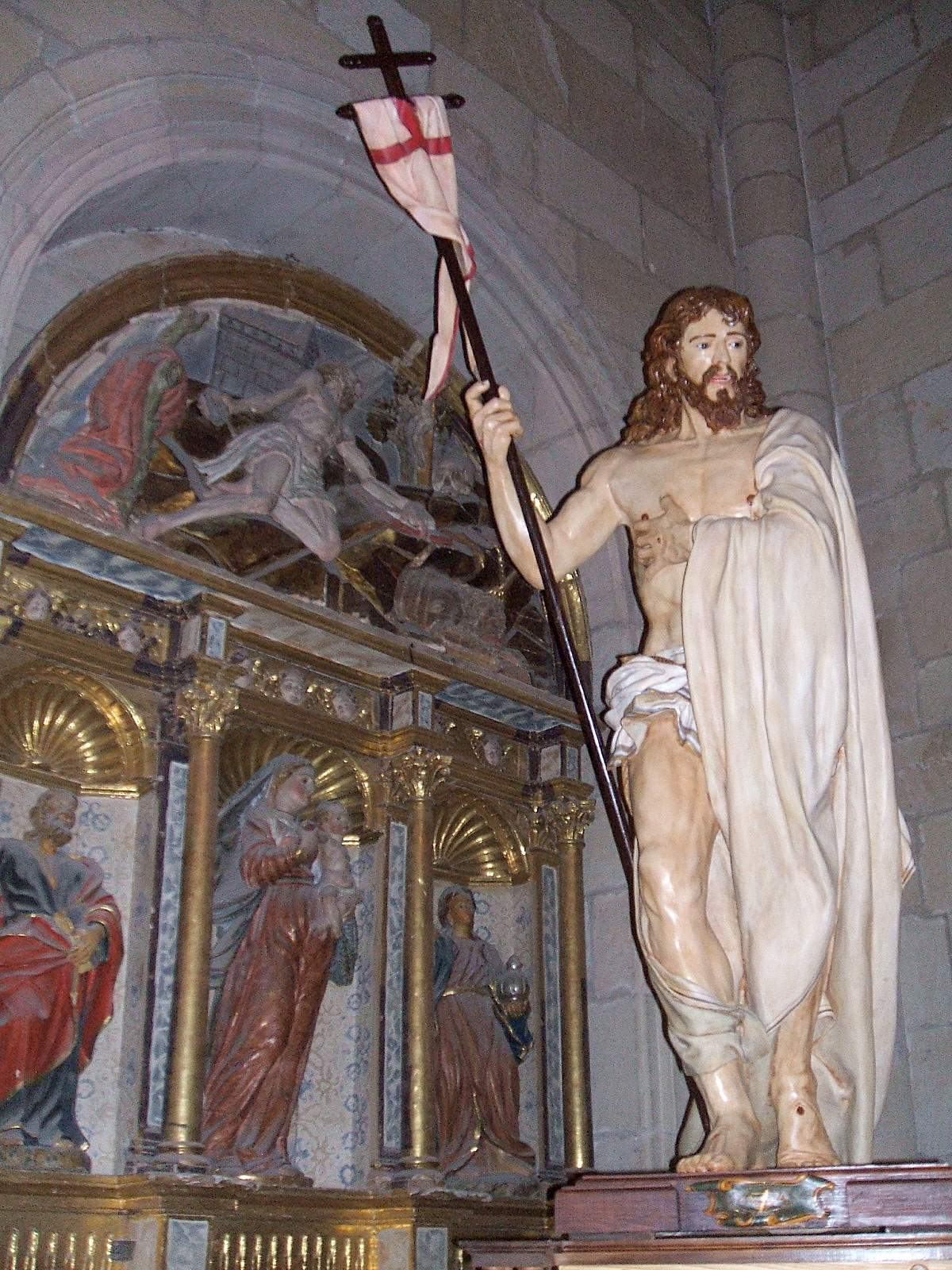 Concatedral de San Pedro, Soria (Castilla y León, España)